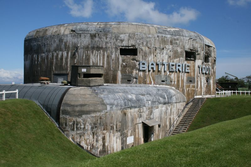 Die in der Nähe der Ortschaft Haringzelle am Cap Gris-Nez gelegene und nach dem Ingenieur Fritz Todt benannte Batterie „Todt“